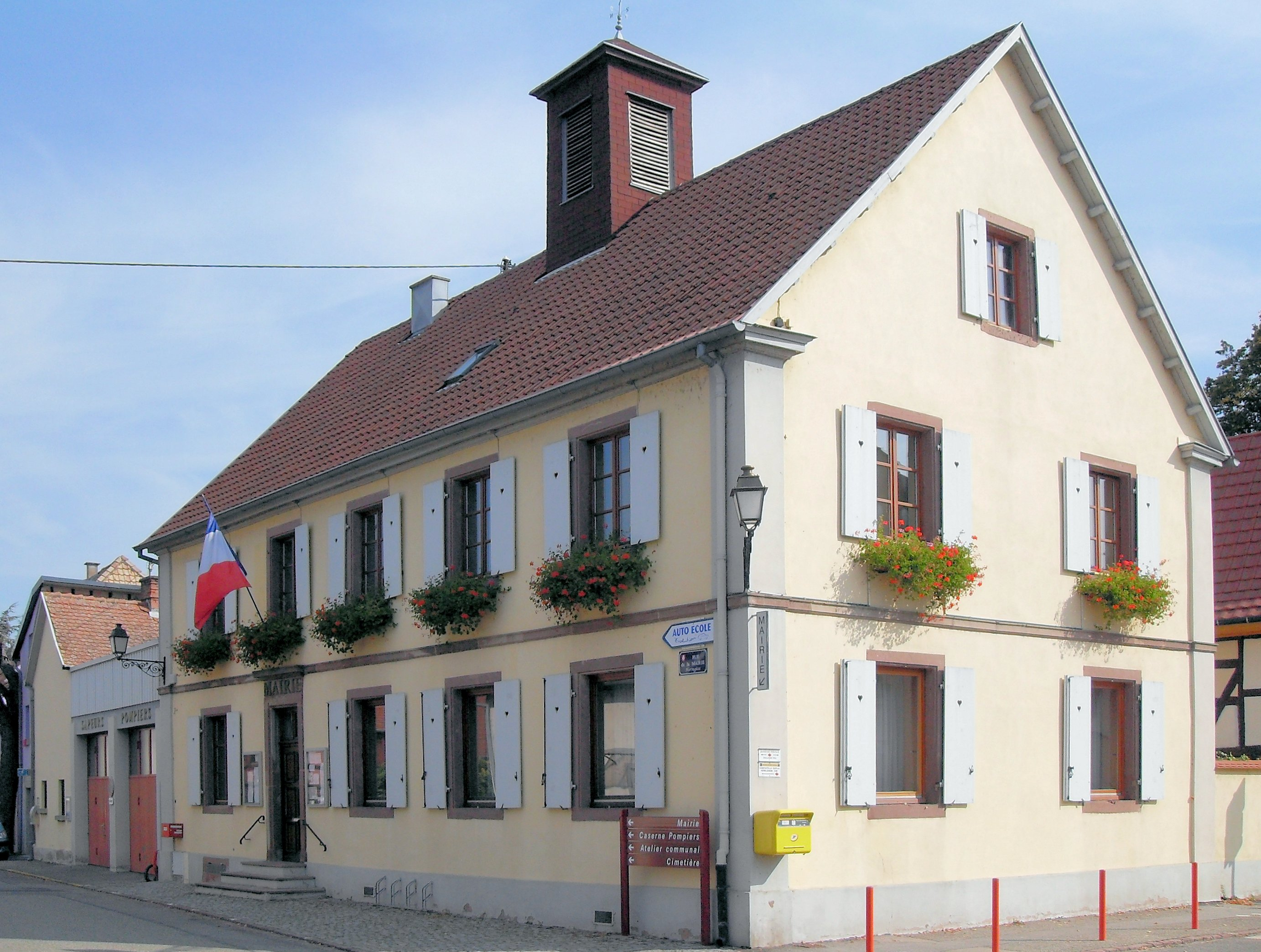 La mairie de Sundhoffen